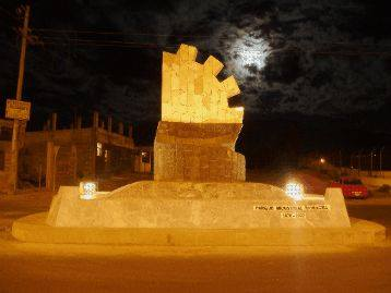 Escultura en mármol